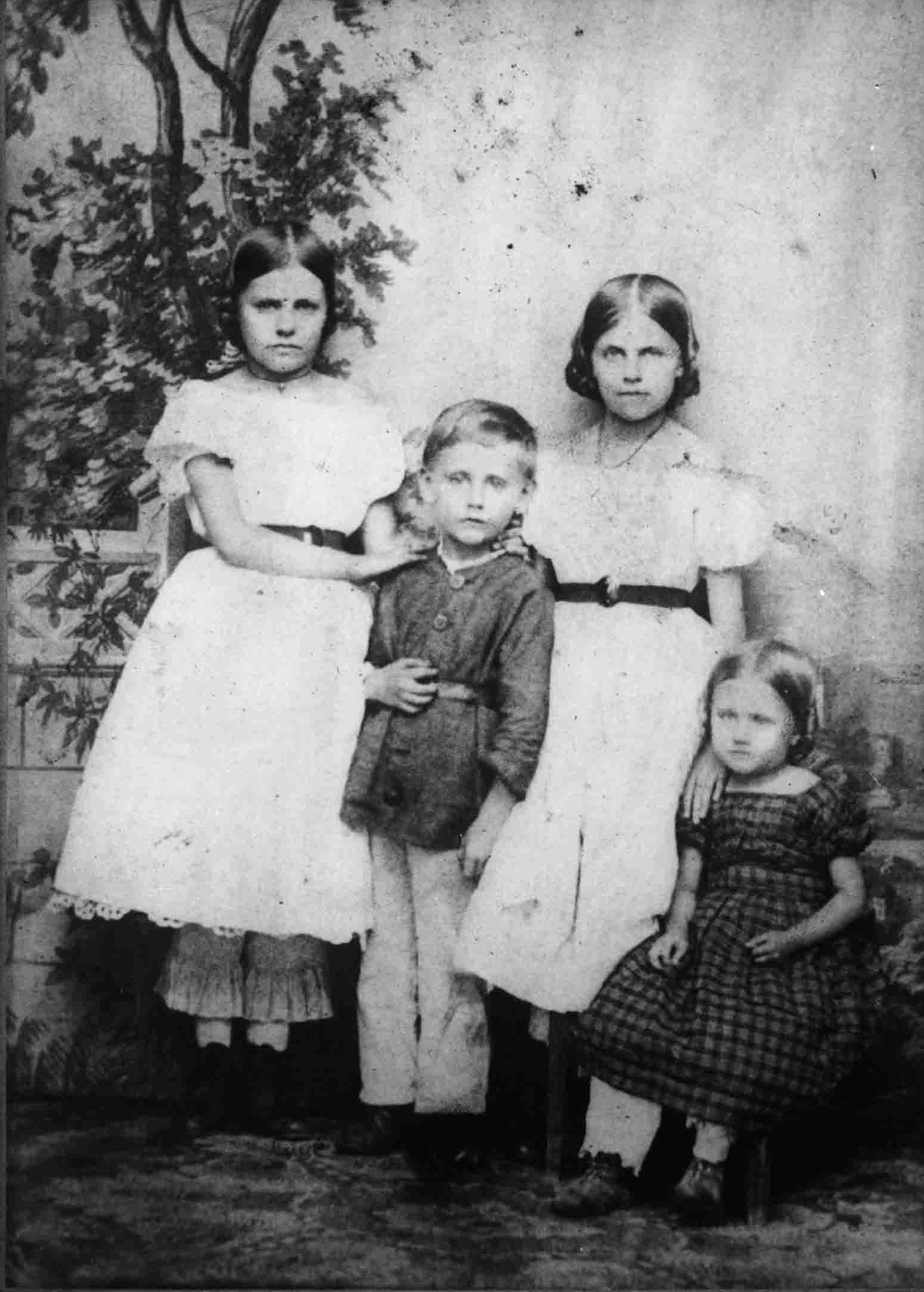 Carl Peters (1856–1918) im Alter von etwa acht Jahren, mit Schwestern.